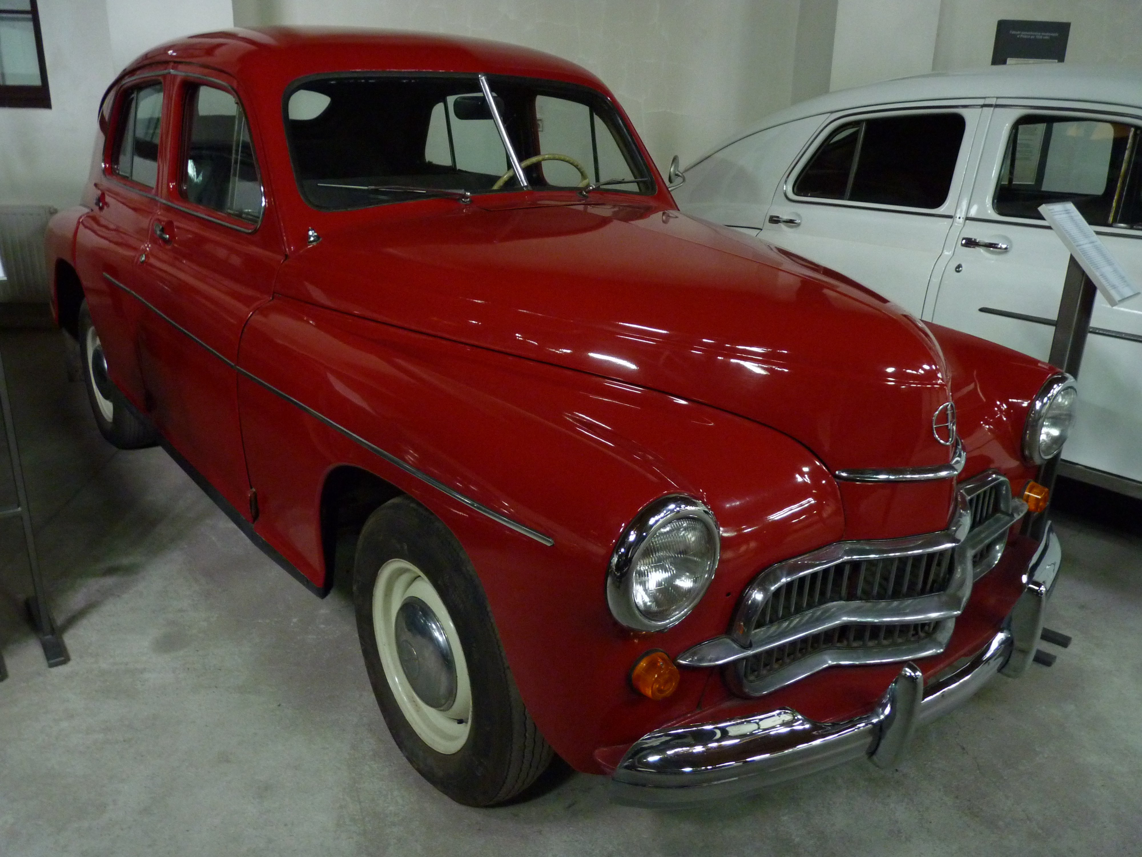 FSO Warszawa 201 at Muzeum Inżynierii Miejskiej in Kraków